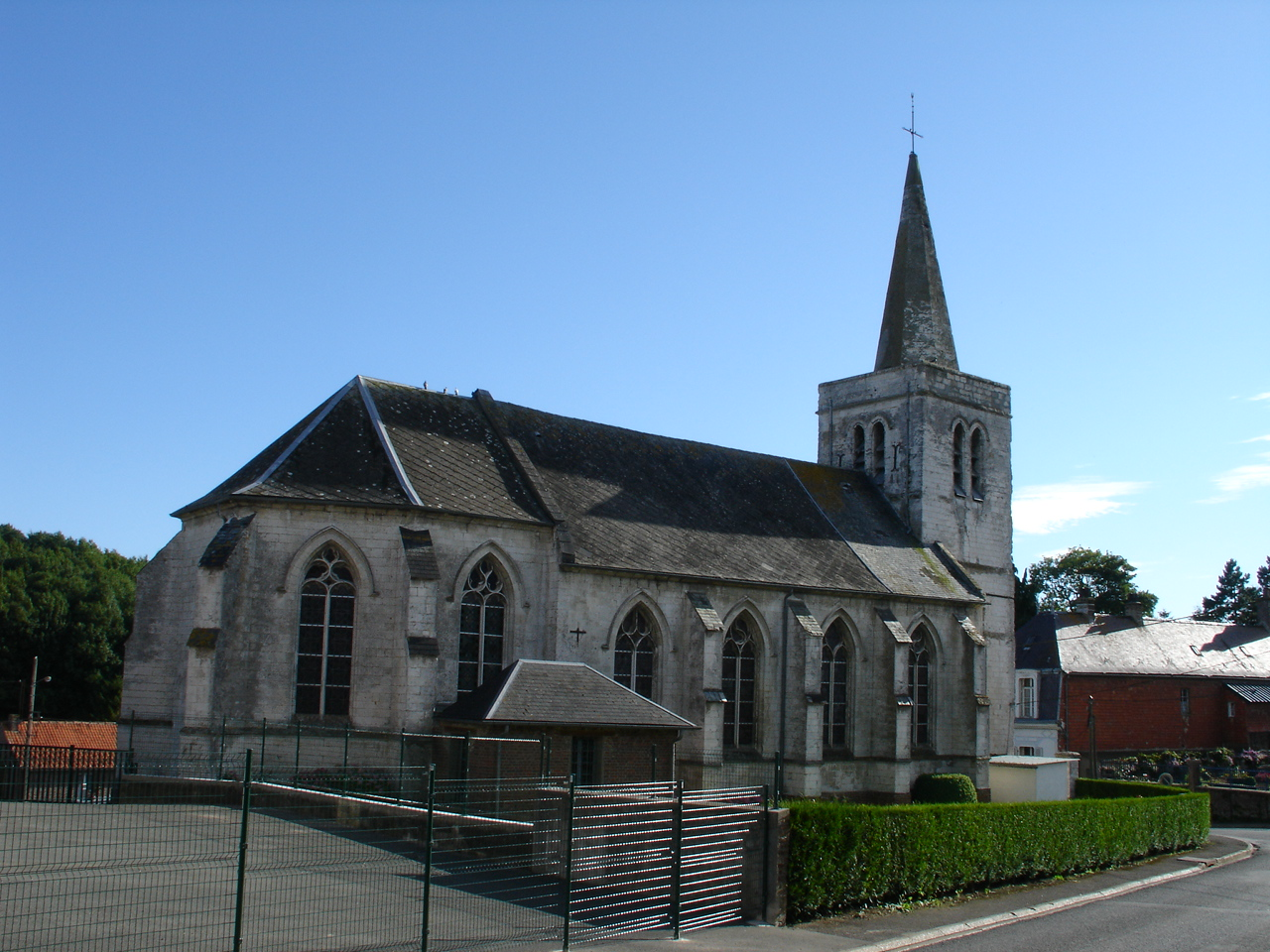 Église de Bayenghem-lès-Seninghem